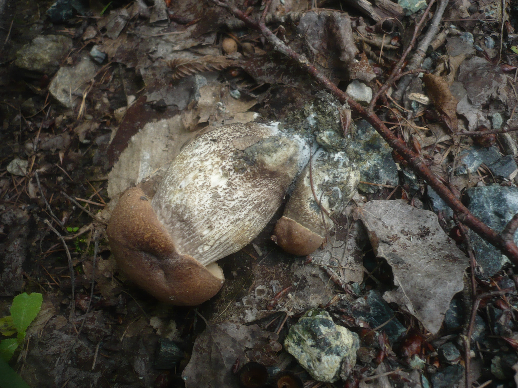 Leccinum duriusculum (Schulzer ex Kalchbr.) Singer